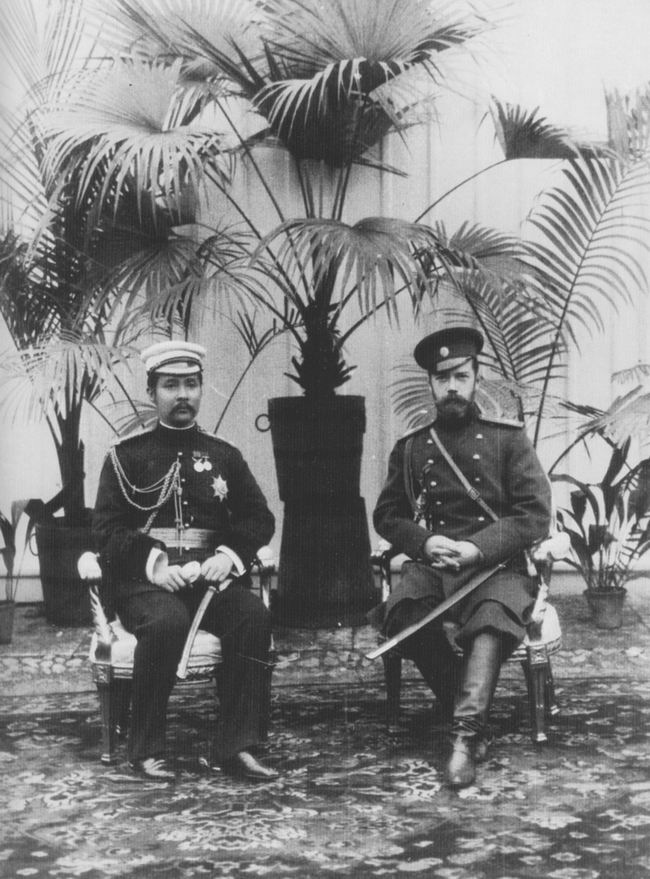 Король Рама Пятый и Николай II, 1897 год, Санкт-Петербург